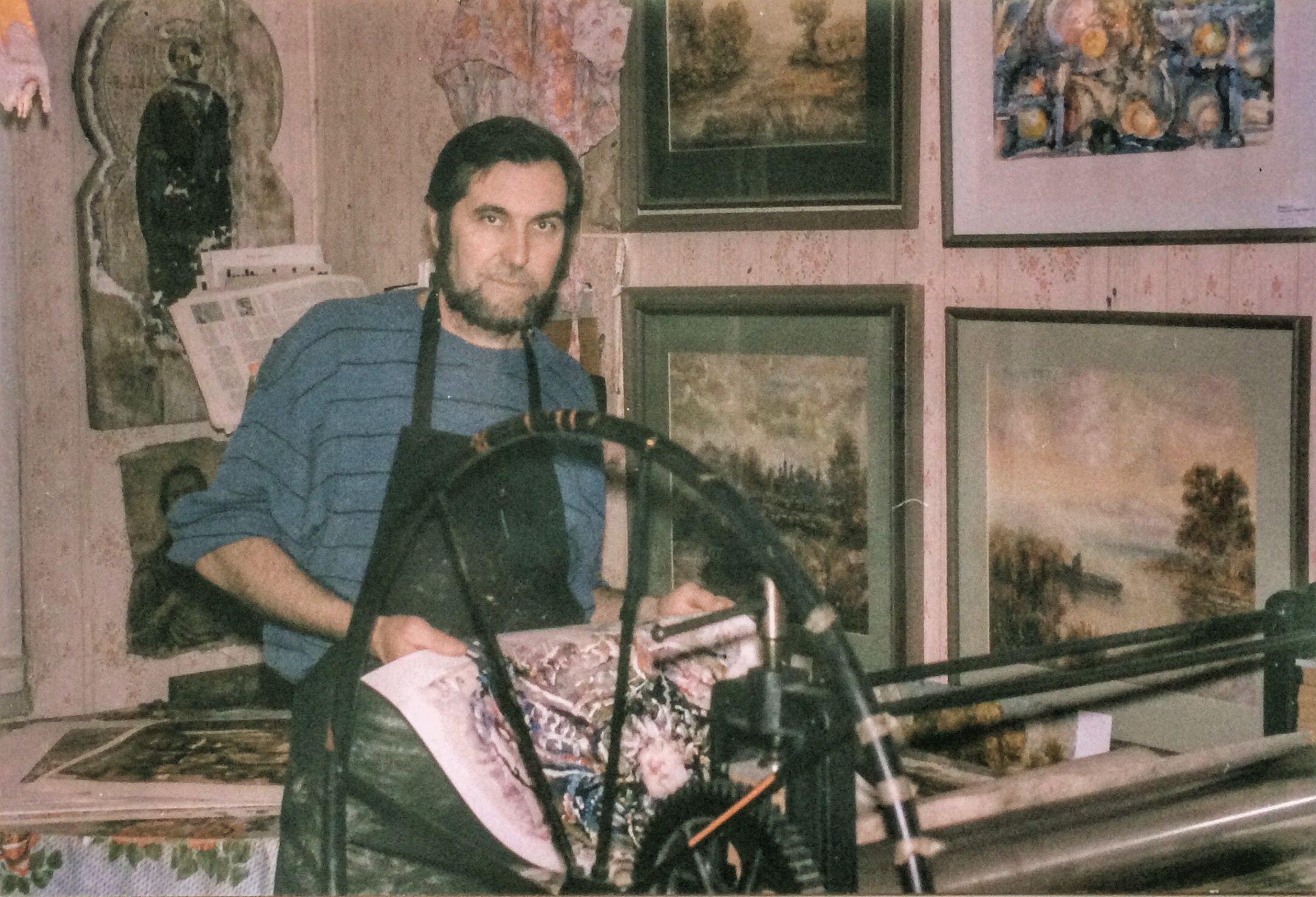 Печать на станке2